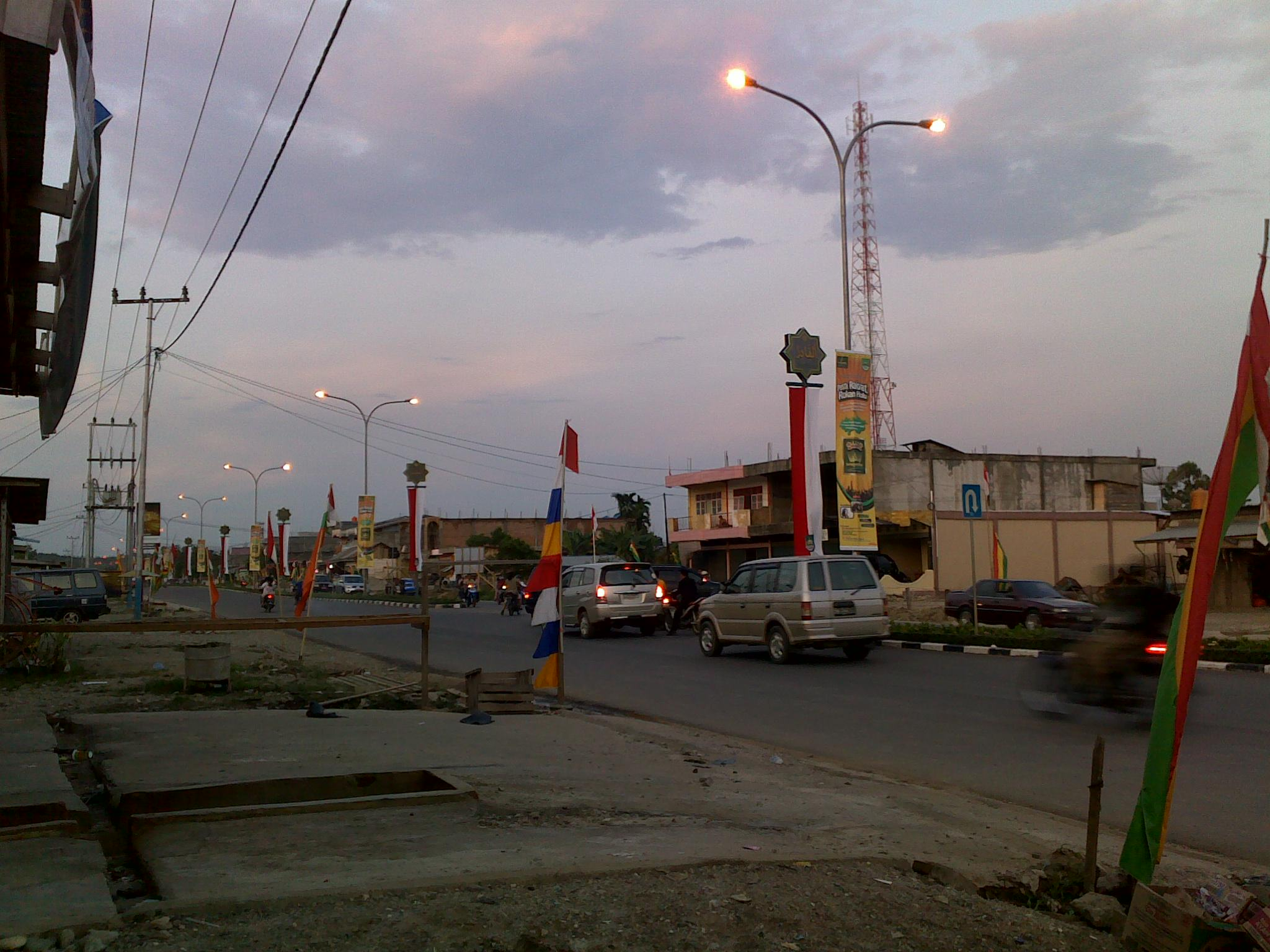 Jalan T. Tambusai